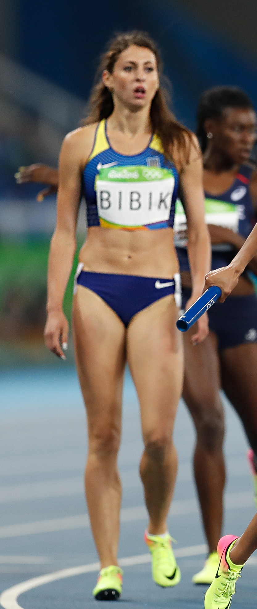 Rio de Janeiro - Eliminatórias do revezamento 4 x 400m nos Jogos Rio 2016, no Estádio Olímpico (Fernando Frazão/Agência Brasil)